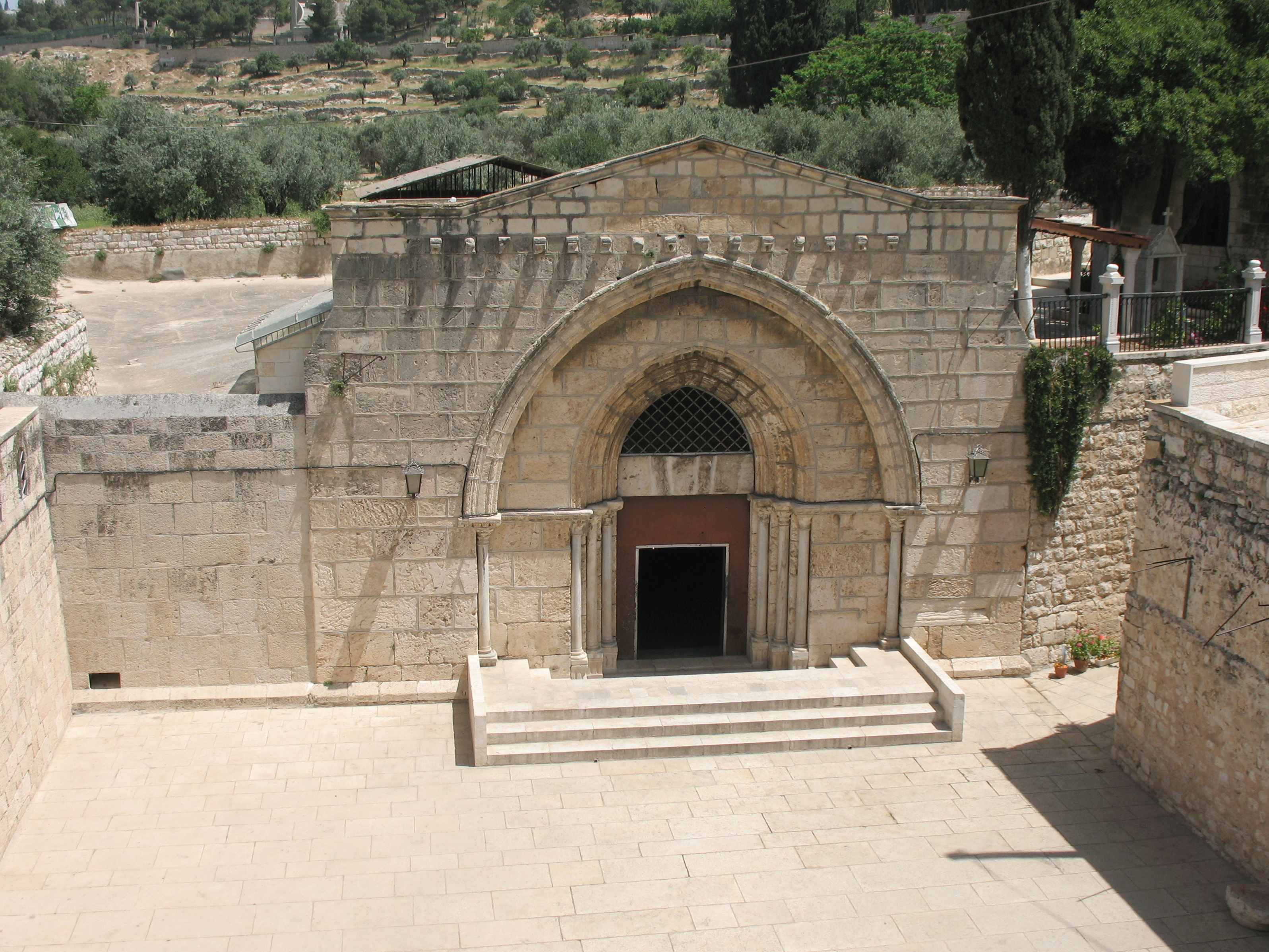 Церковь Успения Пресвятой Богородицы в Гефсимании в Иерусалиме